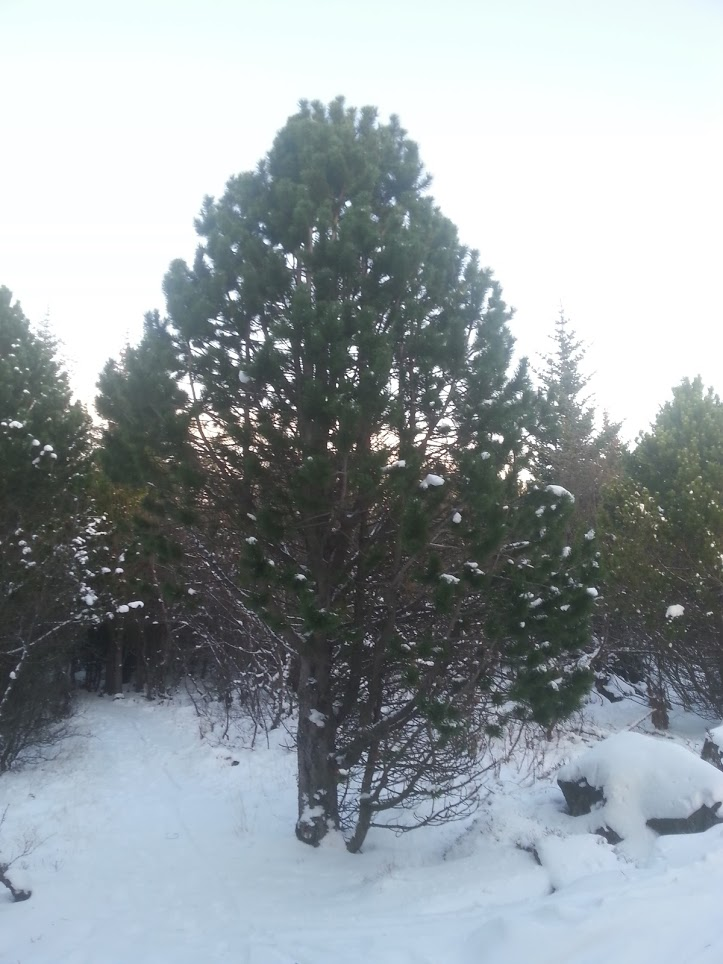 Bergfura, Öskjuhlíð